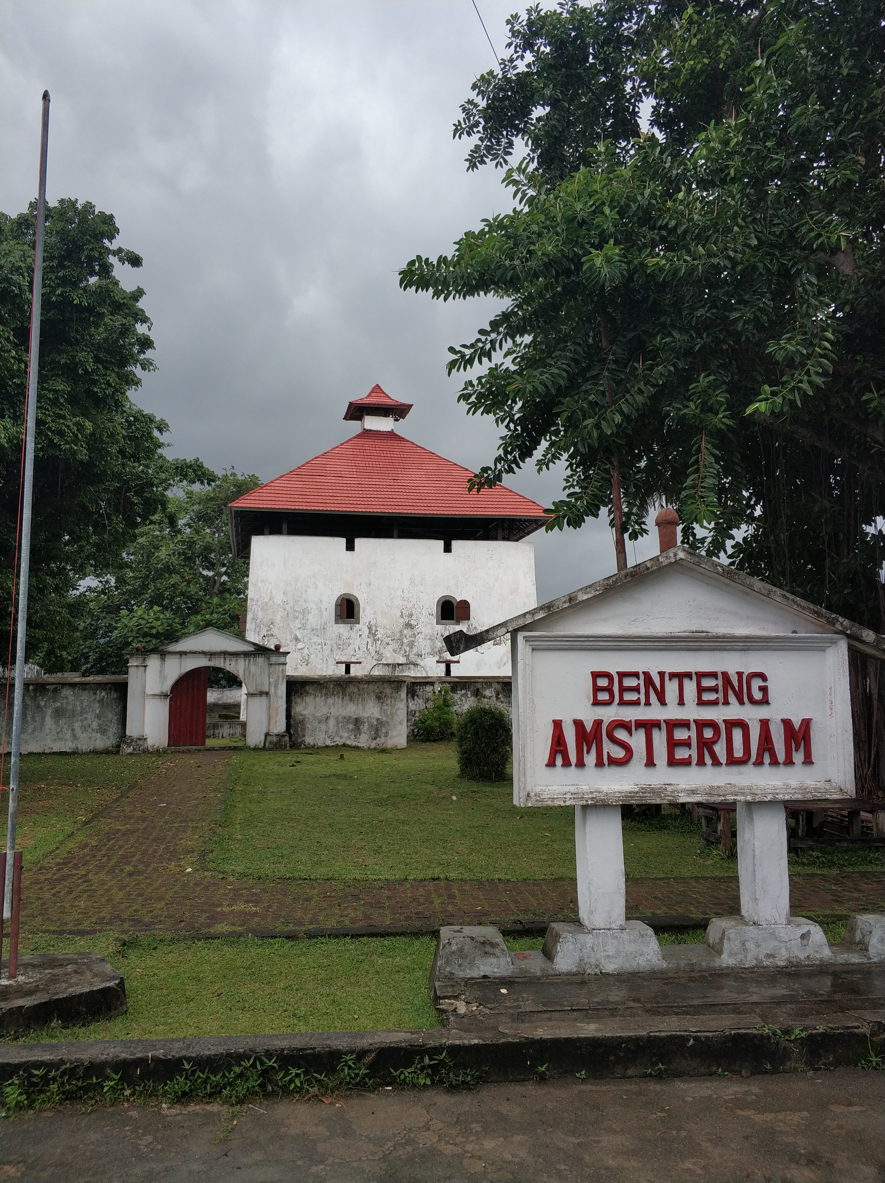 Eingangsbereich